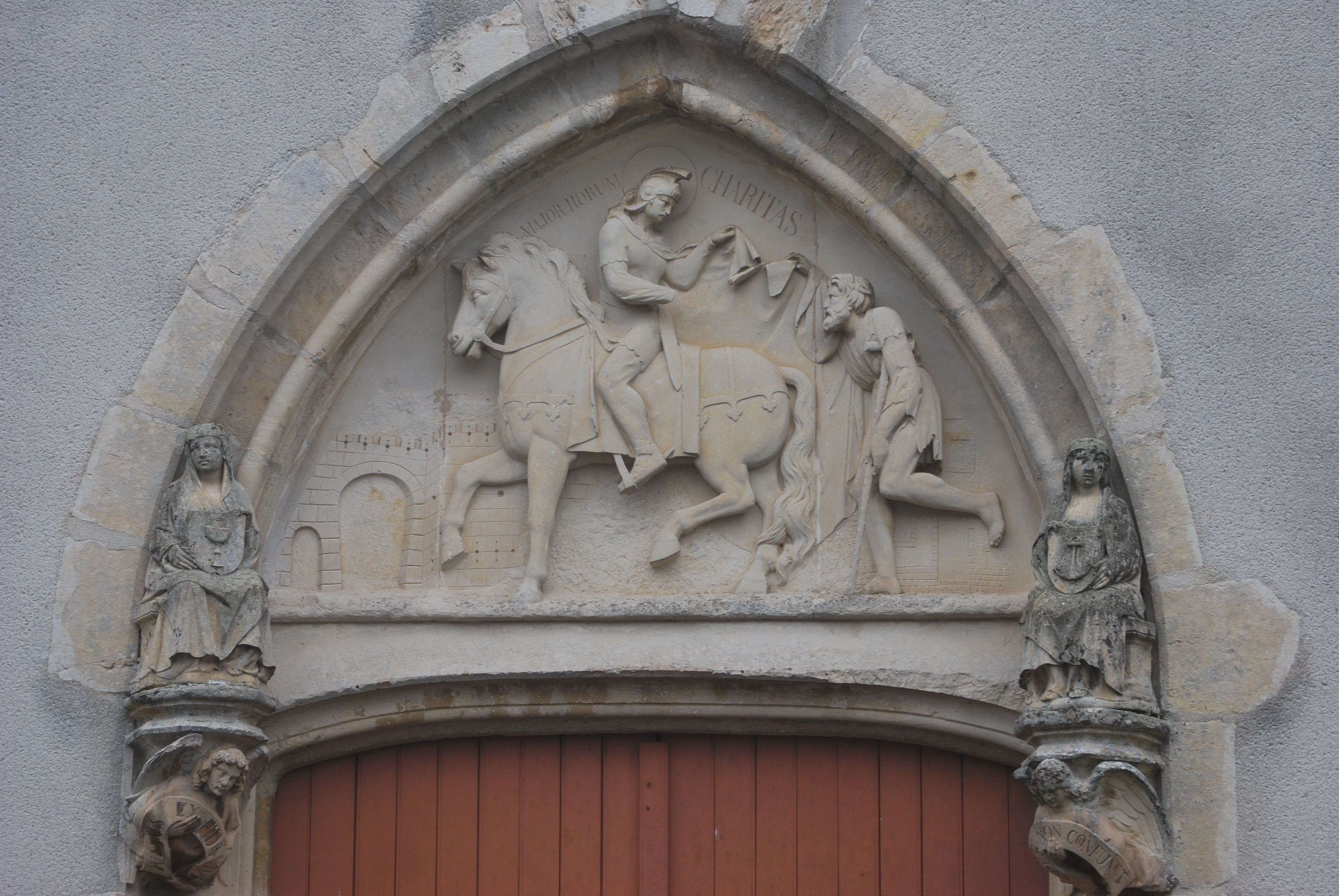 Tympan du portail principal de l'église de Baugy représentant les trois vertus : à droite la foi, à gauche l'espérance, et au centre la charité personifiée par Saint Martin. (XVème siècle)